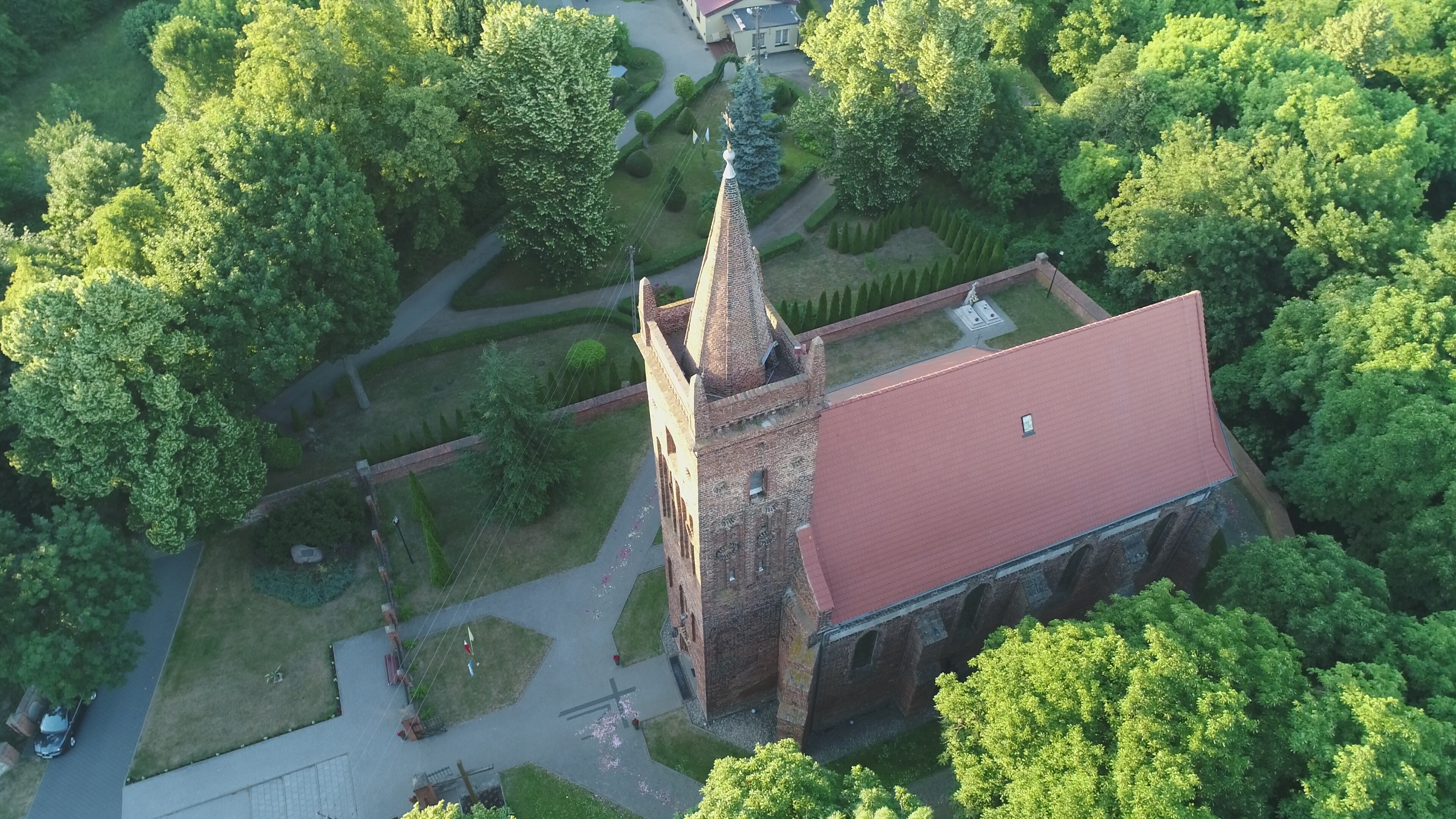 Widok z góry